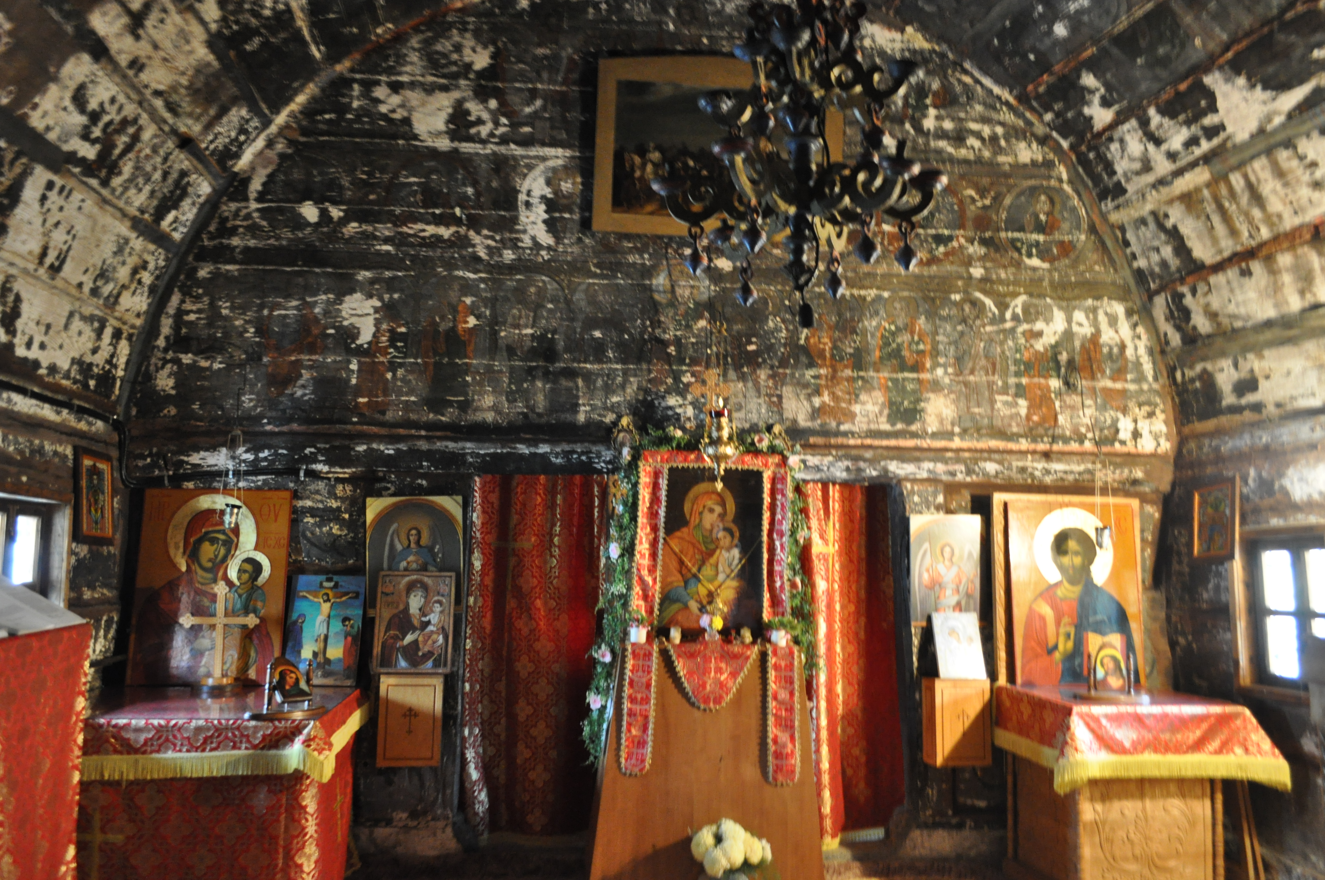 Biserica de lemn "Adormirea Maicii Domnului" a mănăstirii Bic, strămutată din satul Stâna